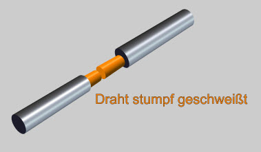 Draht stumpf geschweißt